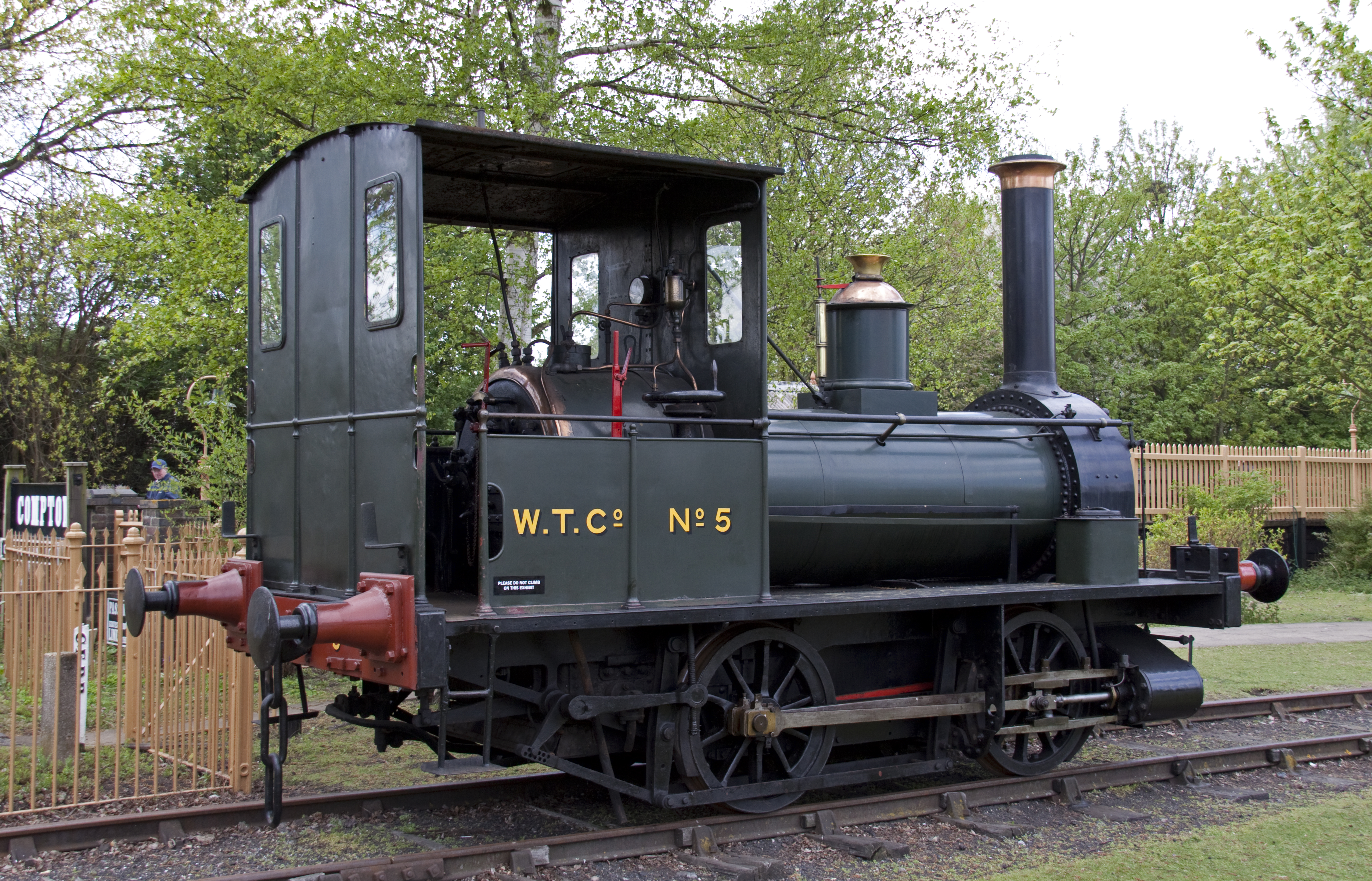 WTCo No5